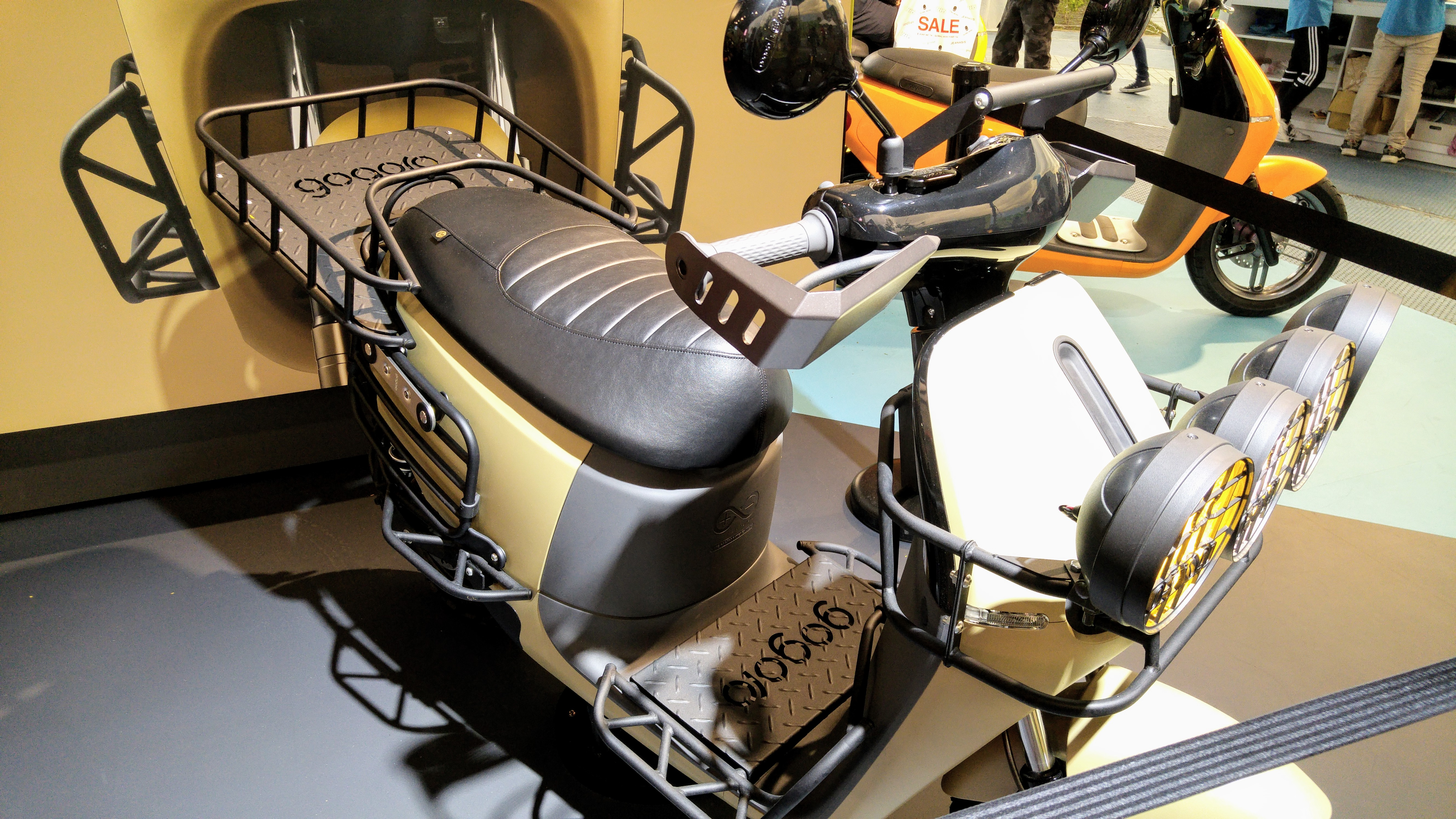 為了展現 Gogoro 2 Series 的多變性，官方提供了越野型的改裝展示車（但並無販售與政府認可上路）。